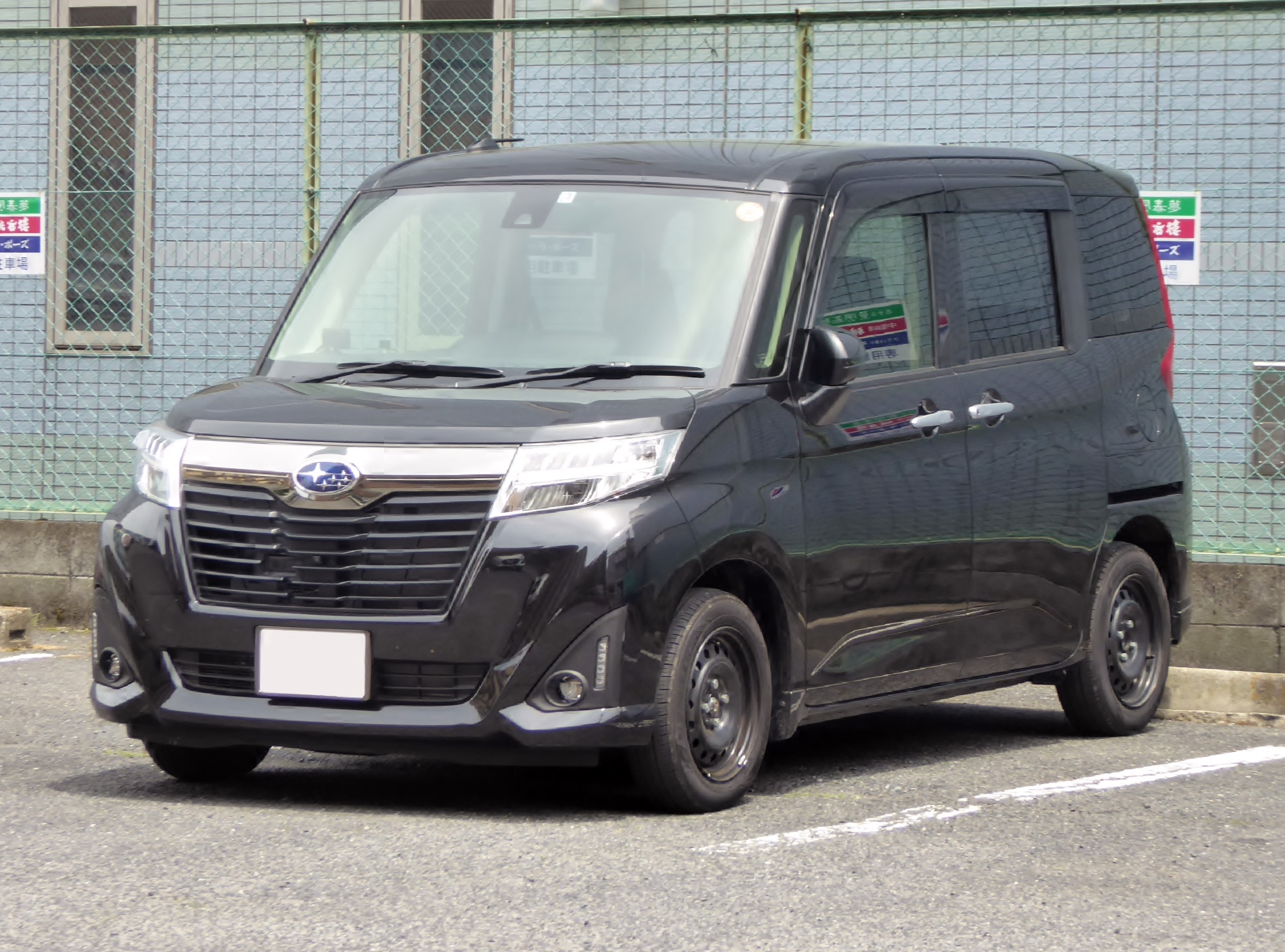 DBA-M900F型スバル・ジャスティGSスマートアシストを撮影。尚、純正の樹脂製フルホイールカバーは取り外してある。